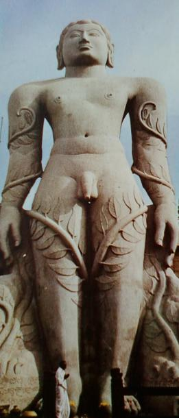 Bahubali statue in Karnataka